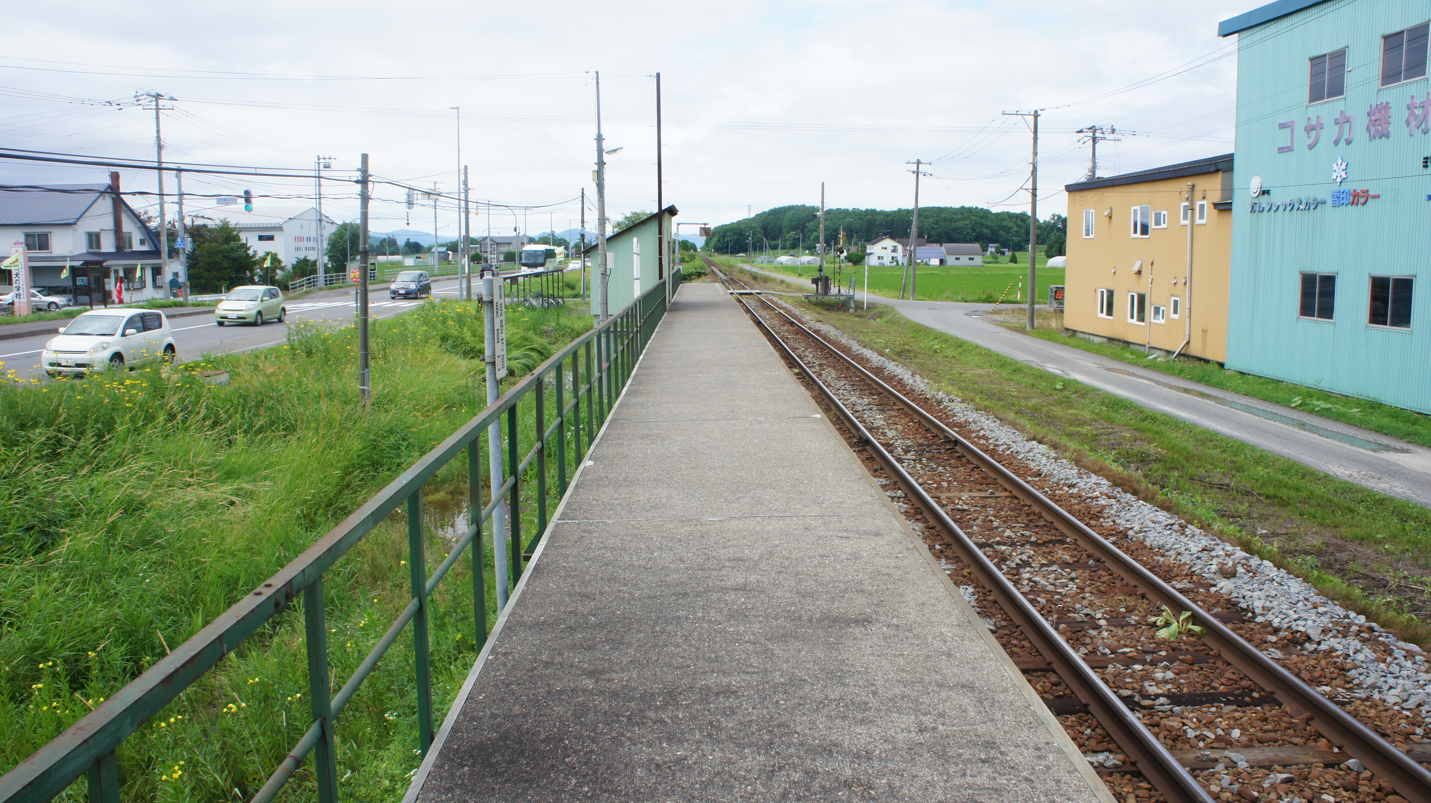 JR富良野線・西瑞穂駅のホーム